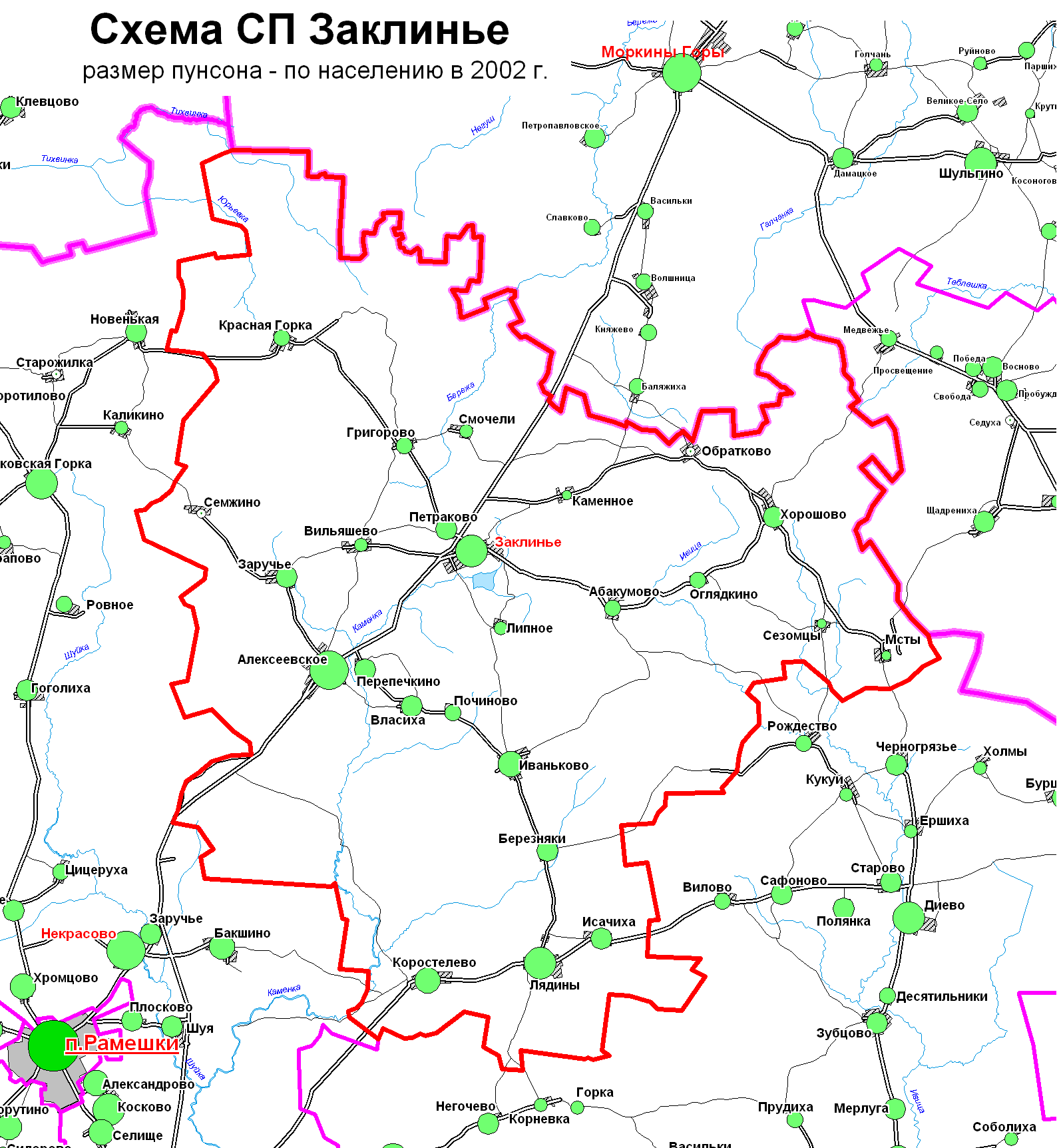 Схема сп Заклинье Тверской области